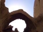 روستای هفتومان